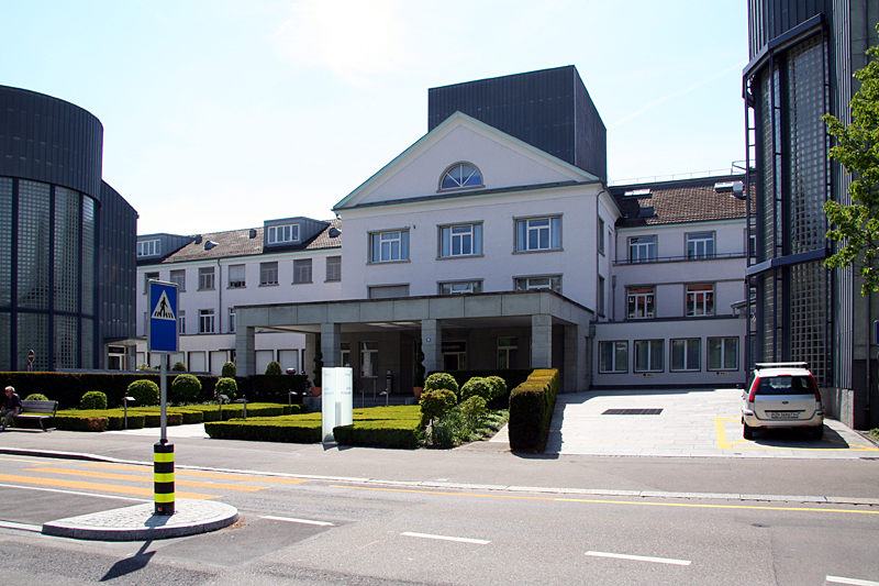 Haupteingang der Privatklinik Hirslanden in Zürich beim Balgrist